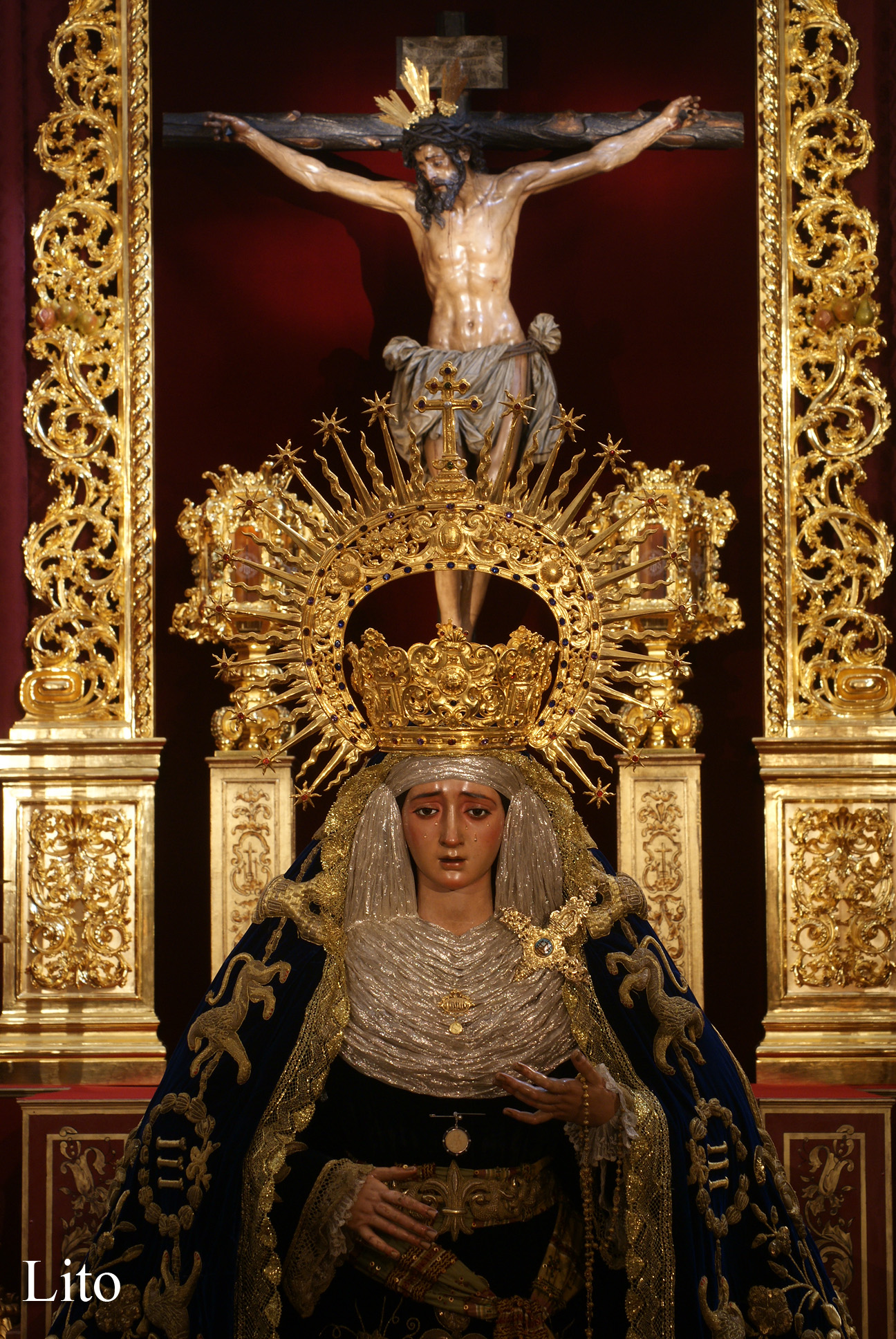 Santísimo Cristo de la Conversión y Nuestra Señora de Montserrat.